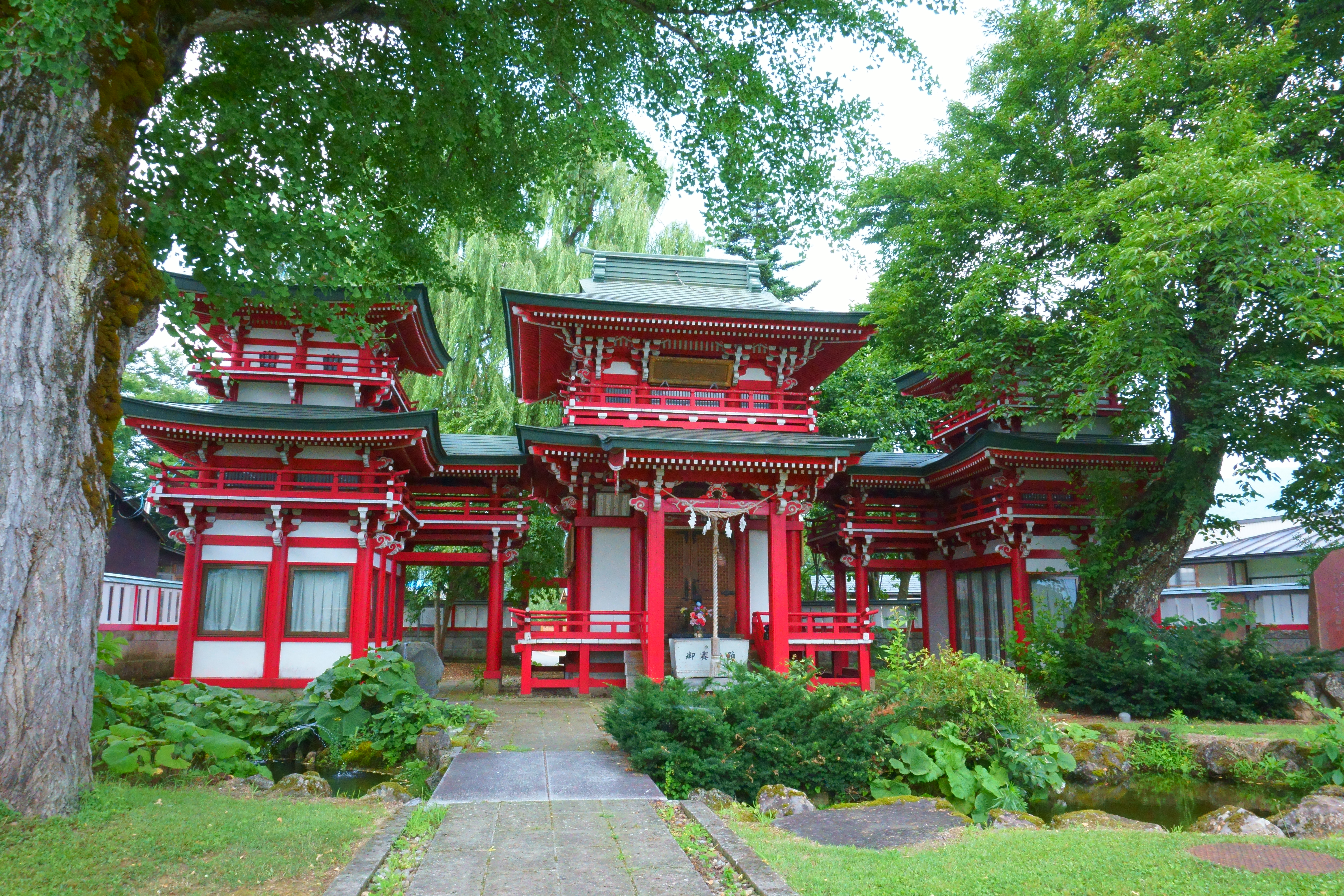 小町堂（秋田県湯沢市 小野）。小野小町の生誕と死没の地と伝わる同地で、その霊を祀る小町神社の老朽化にともない、1995年に建立された。